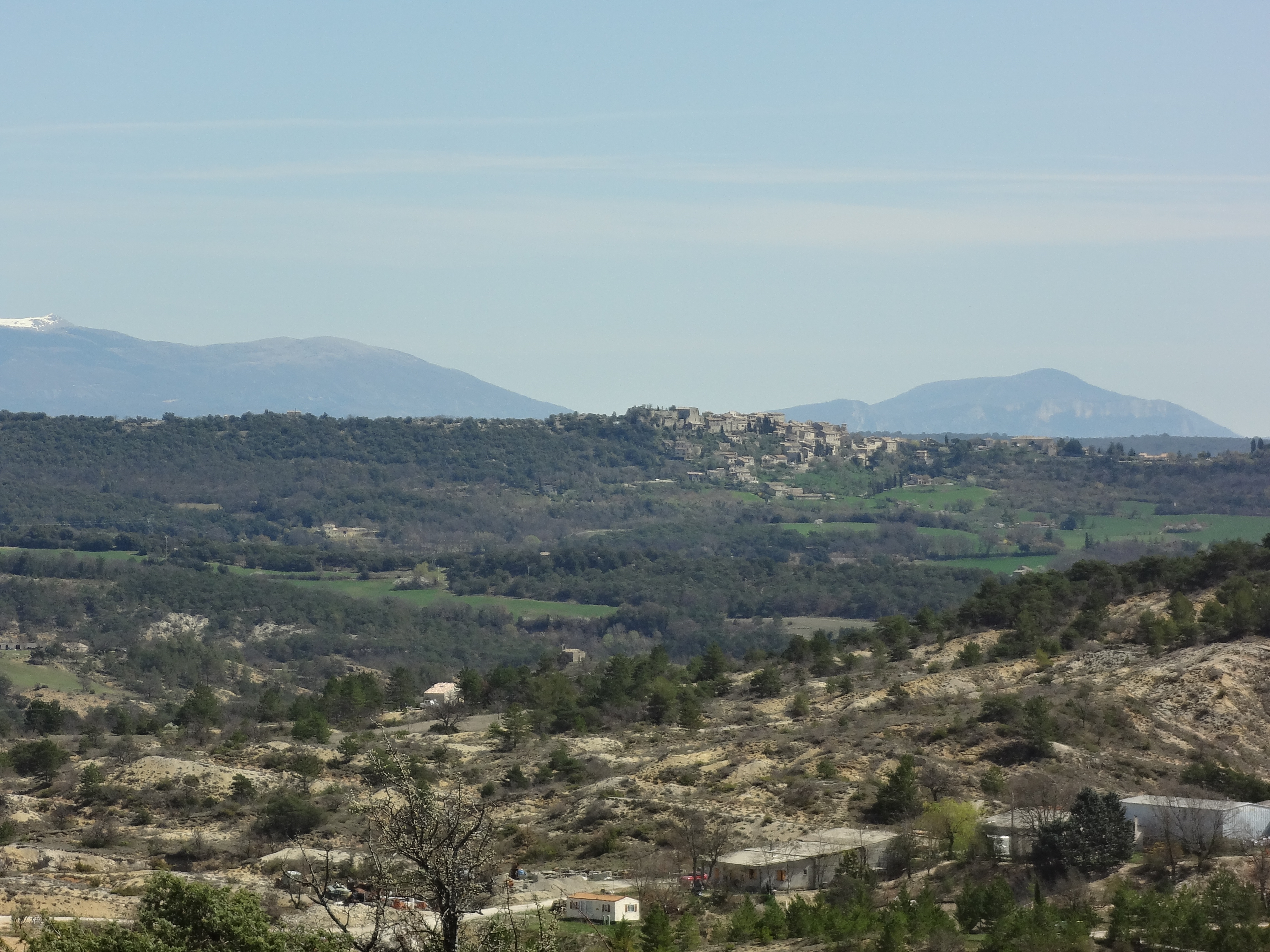 Vue du village de Lurs sur sa colline